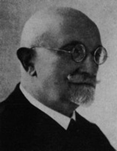 Josef Richard Vilímek (1860 - 1938), Český vydavatel a majitel nakladateldtví.